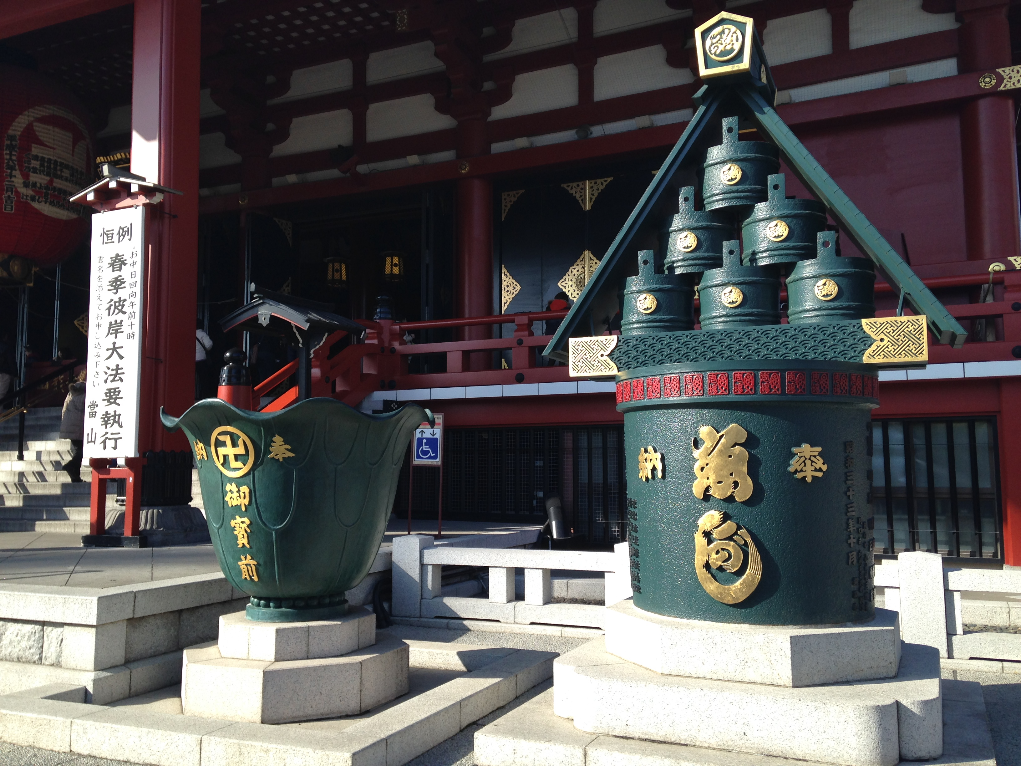 浅草寺・本堂の前にある御宝前と魚がしの天水桶